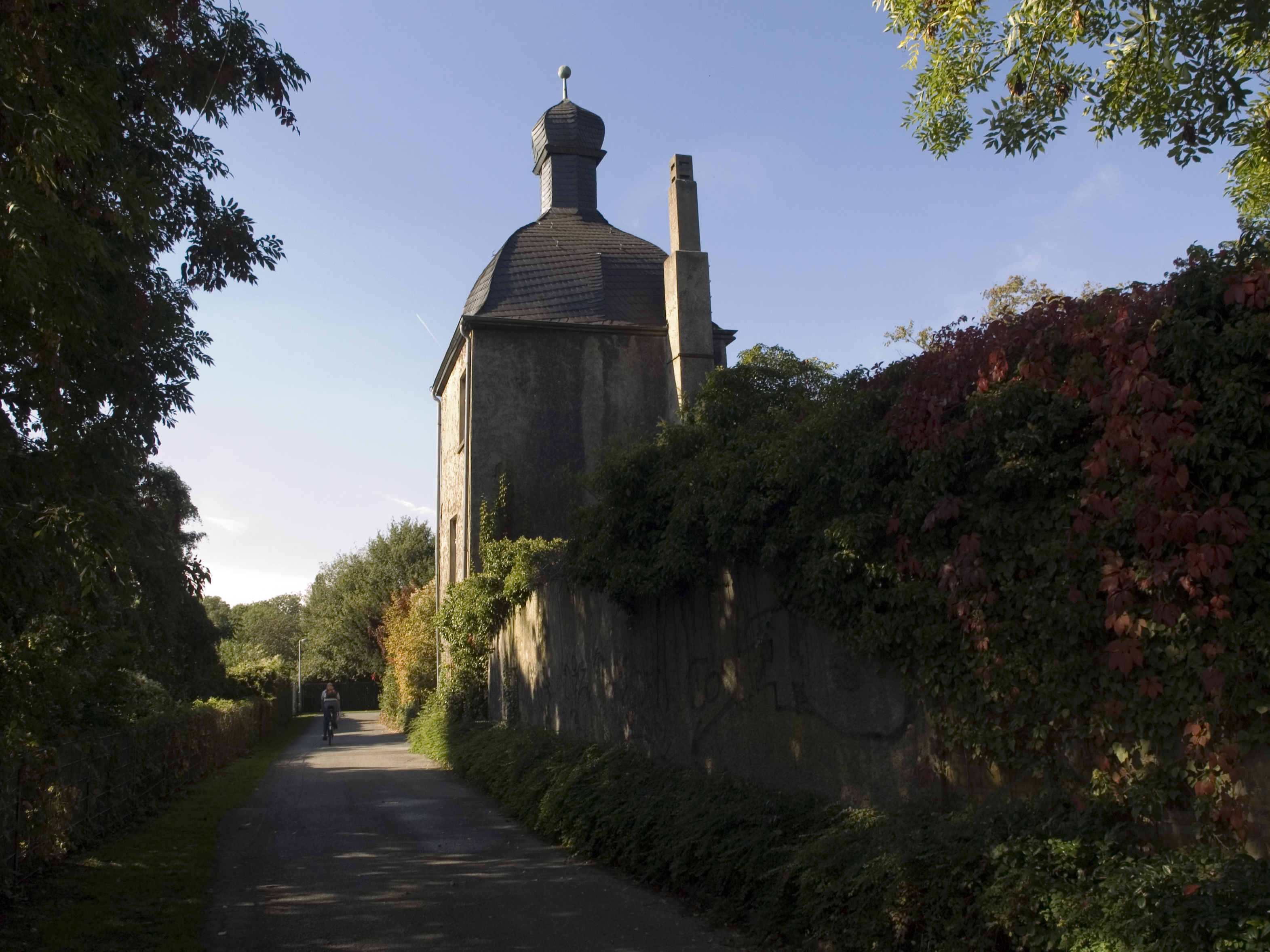 Северный Рейн-Вестфалия, Мюльхайм-на-Руре - замок Штюрум